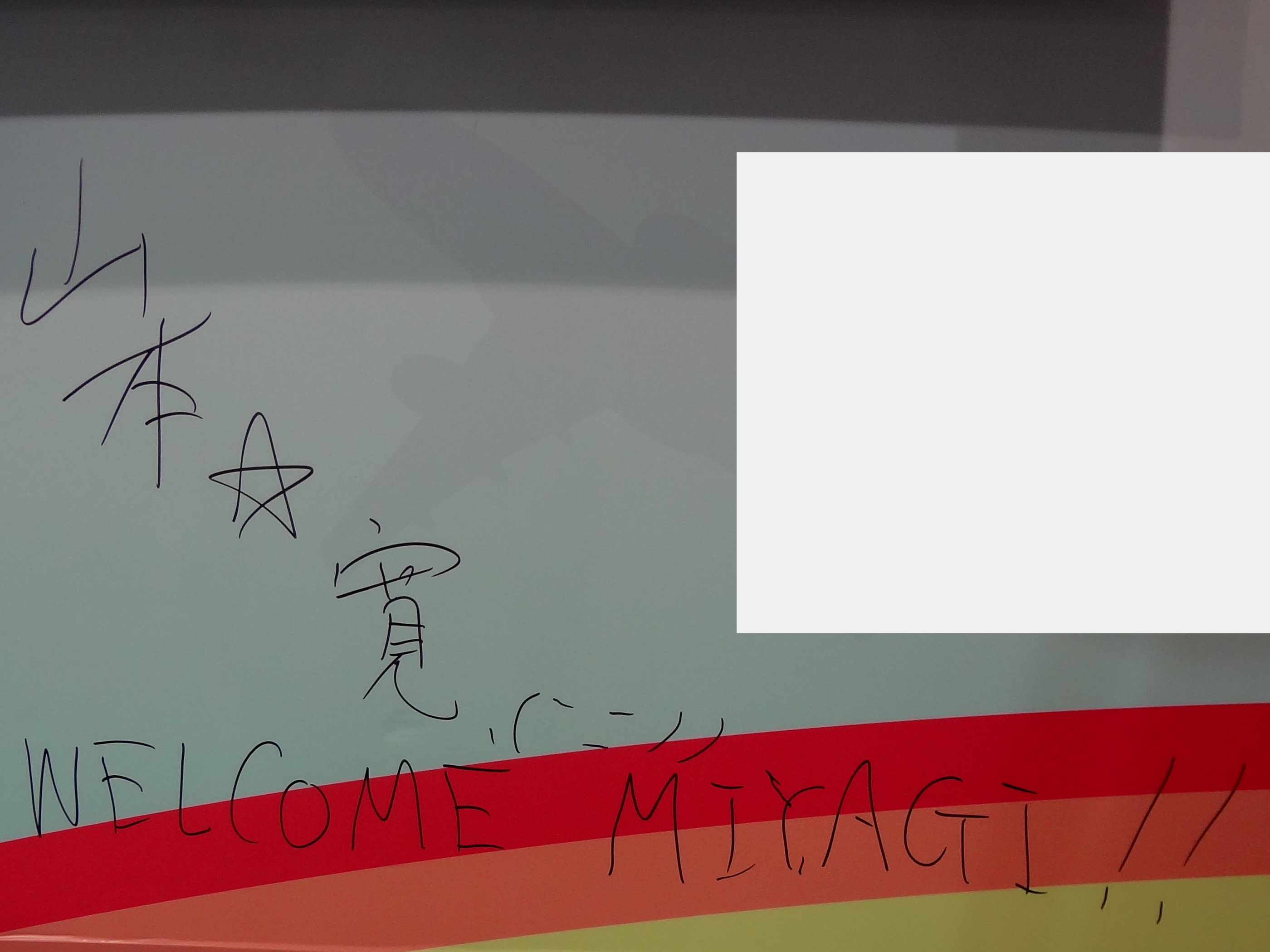 2016年第四屆台北國際動漫節，日本動畫導演山本寬的簽名。